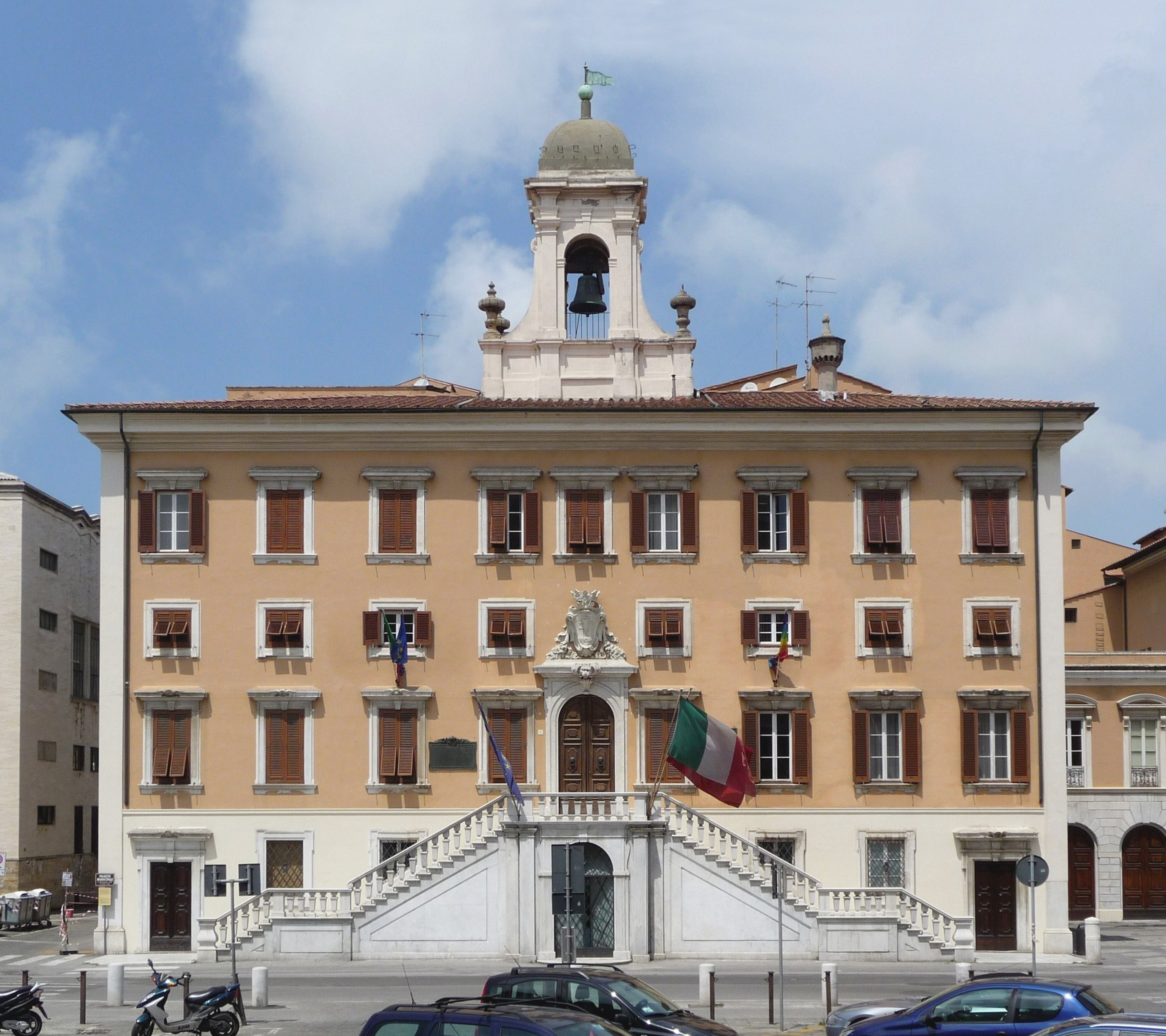 Livorno: il Palazzo Comunale risalente al XVIII secolo e restaurato dopo la seconda guerra mondiale.